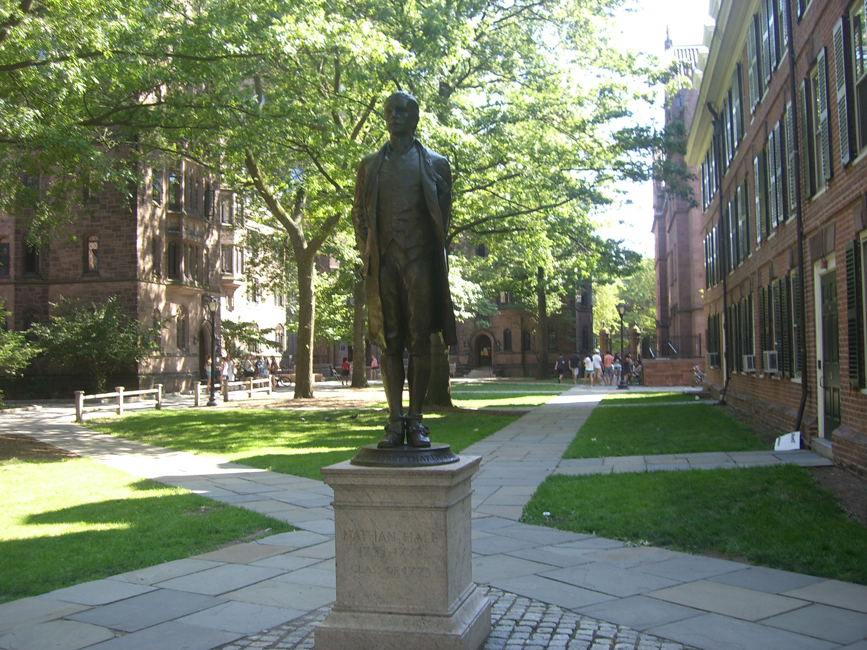 Statue von Nathan Hale vor der Connecticut Hall auf dem Campus von Yale, New Haven